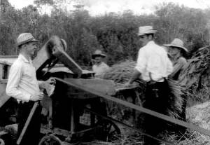 Trabalhadores de Agudos do Sul na década de 60.